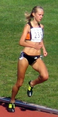 Karin Storbacka yleisurheilun 22-vuotiaiden SM-kisoissa Porin stadionilla